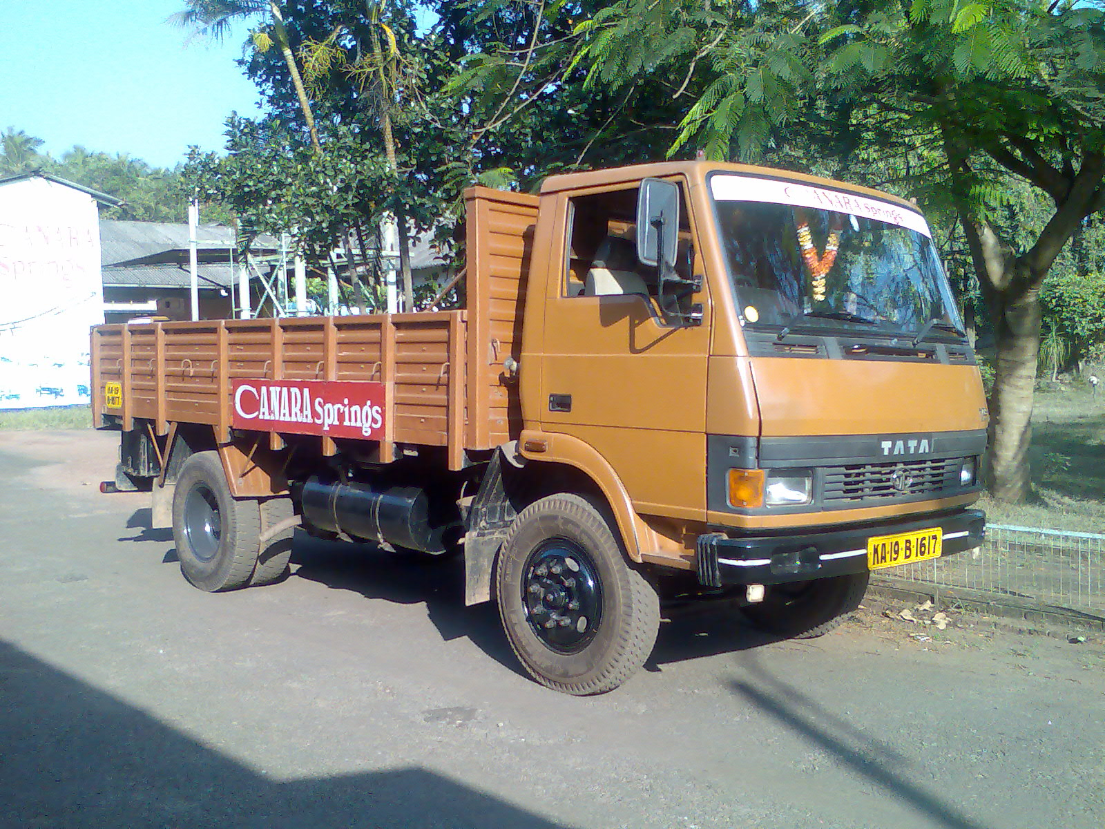 Tata 1109 truck